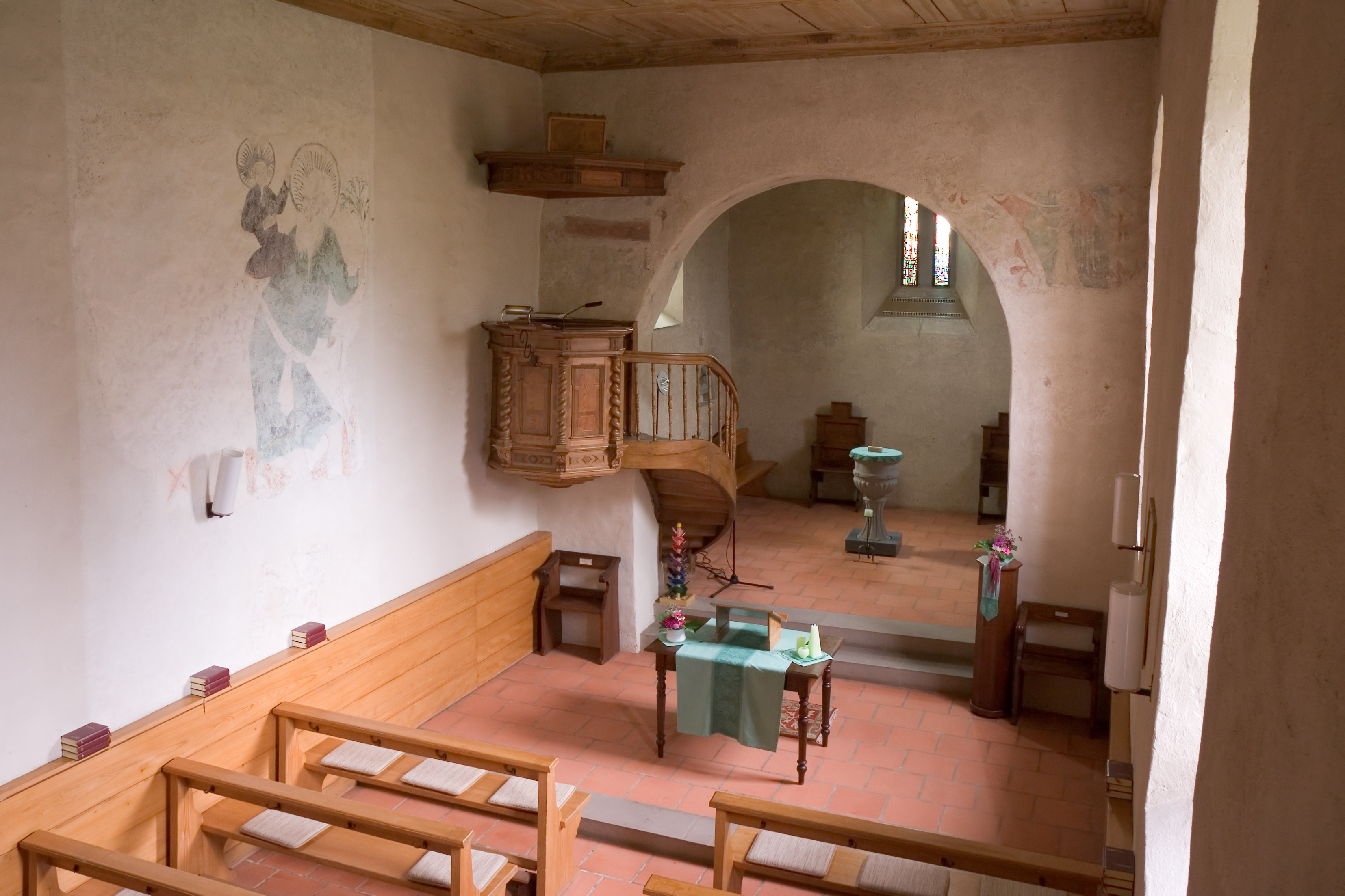 Innenansicht der Kirche Schlattingen, Thurgau, Schweiz